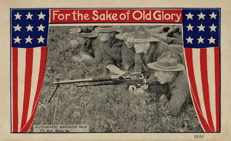 Model 1909 machine rifle (Benet-Mercie) with US soldiers.